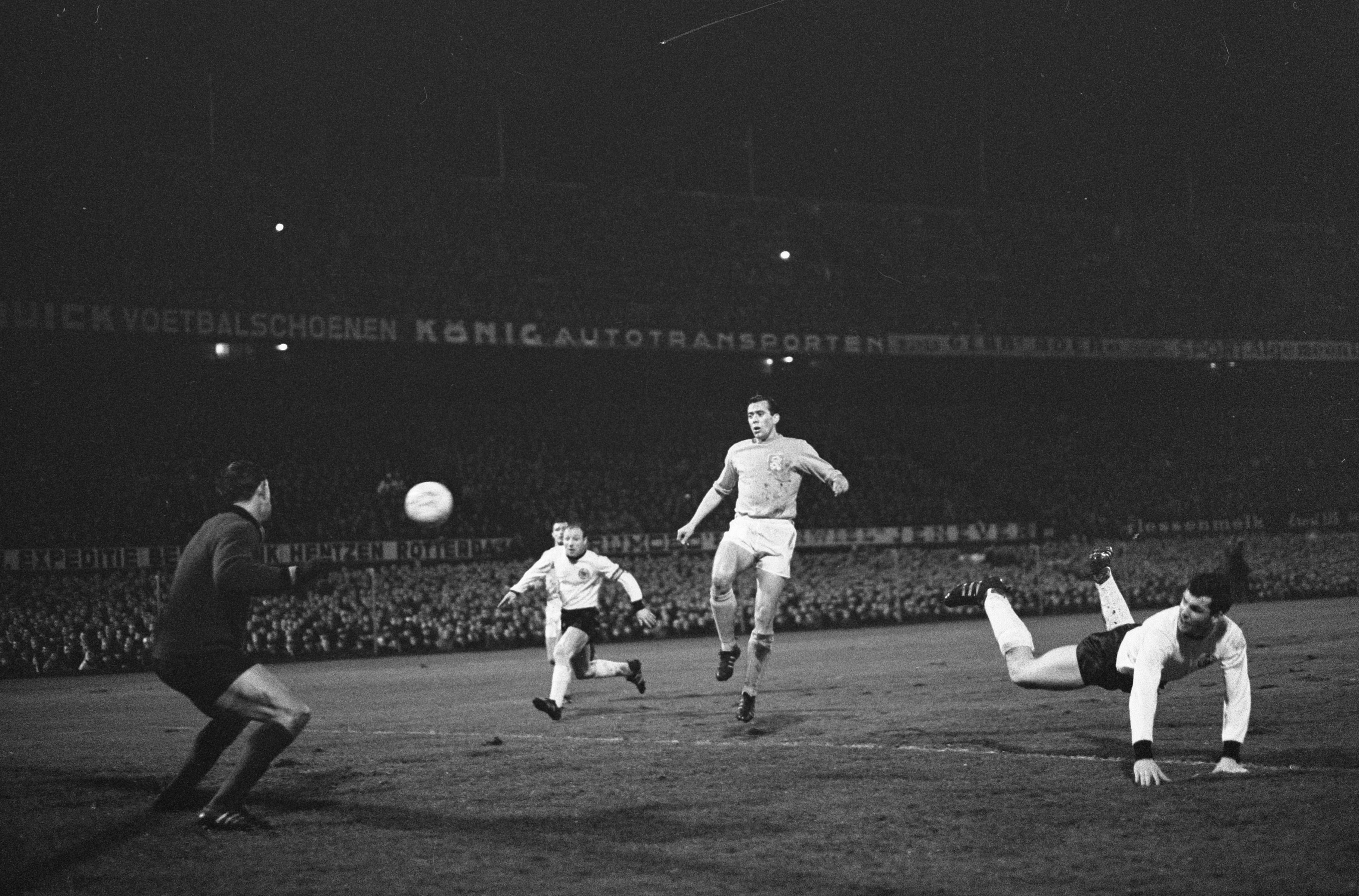 Collectie / Archief : Fotocollectie Anefo Reportage / Serie : [ onbekend ] Beschrijving : Nederland tegen West-Duitsland 2-4, eerste Duitse doelpunt Graafland, Seiter, Schrijvers en Emmerich (scoort duikend) Datum : 23 maart 1966 Trefwoorden : doelpunten, sport, voetbal Persoonsnaam : Graafland Fotograaf : Kroon, Ron / Anefo Auteursrechthebbende : Nationaal Archief Materiaalsoort : Negatief (zwart/wit) Nummer archiefinventaris : bekijk toegang 2.24.01.05 Bestanddeelnummer : 918-9493